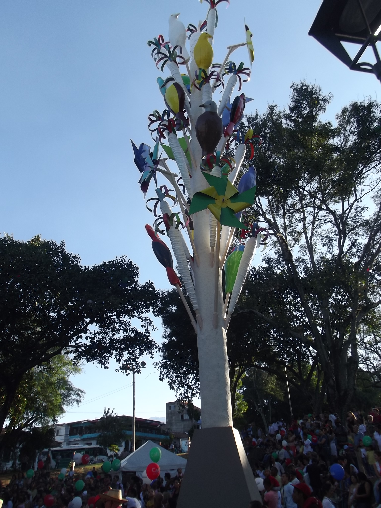 Monumento a la Maceta en San Antonio